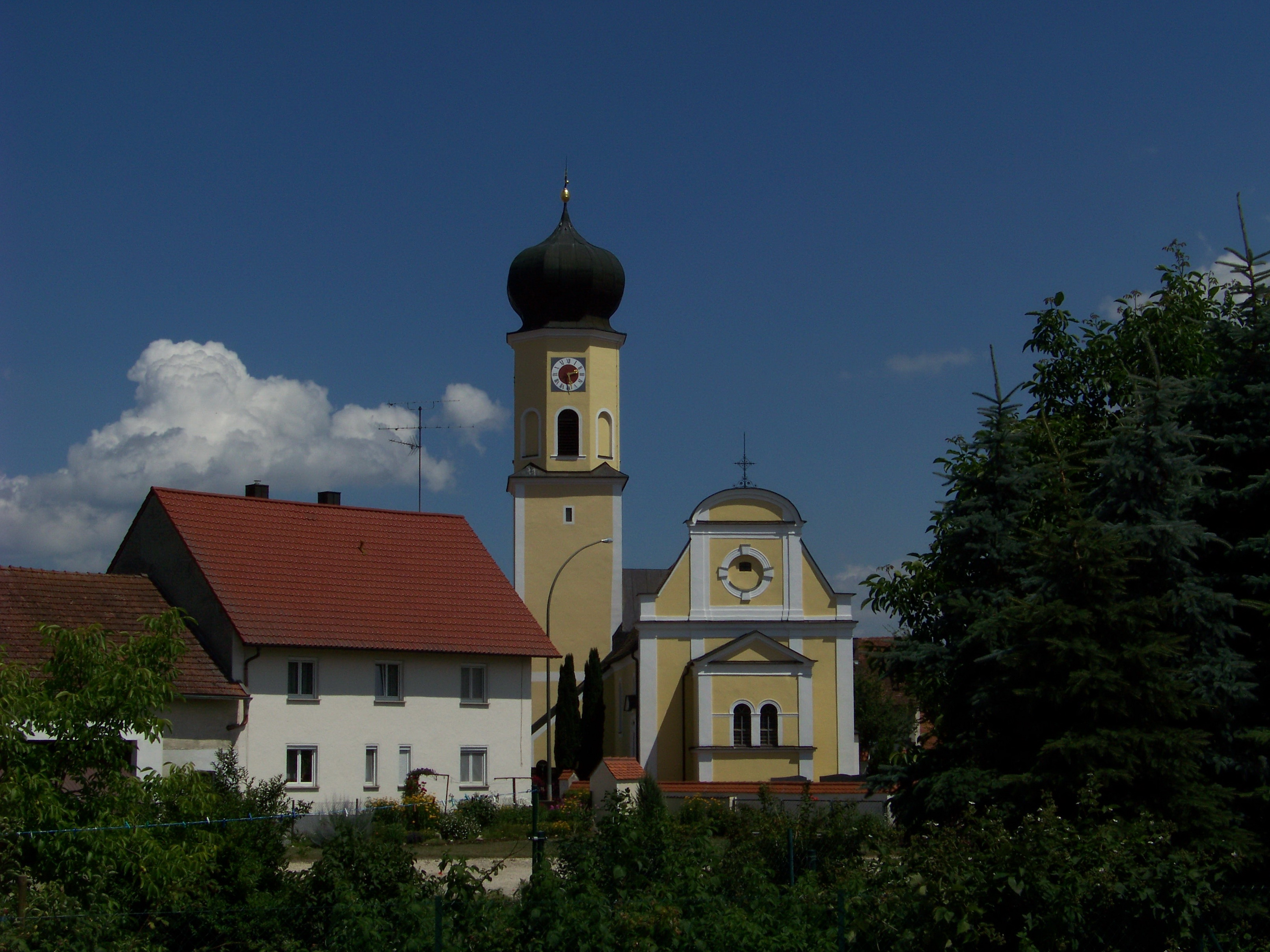 Mötzing. Kastnerstraße; Kastnerstraße 58; Laaberallee. Kath. Benefiziumskirche Maria Immaculata, Saalbau mit abgewalmtem Satteldach, Flankenturm mit Zwiebelhaube und Giebelfassade mit Vorbau und Pilastergliederung, Chor und Turm gotisch, Langhaus im Kern romanisch, Erweiterung im Barock und Ende 19. Jahrhundert in Neurenaissanceformen; mit Ausstattung, am Langhaus Seelenhaus mit gotischer Pietà, um 1430; Friedhofsmauer, 18. /19. Jahrhundert.